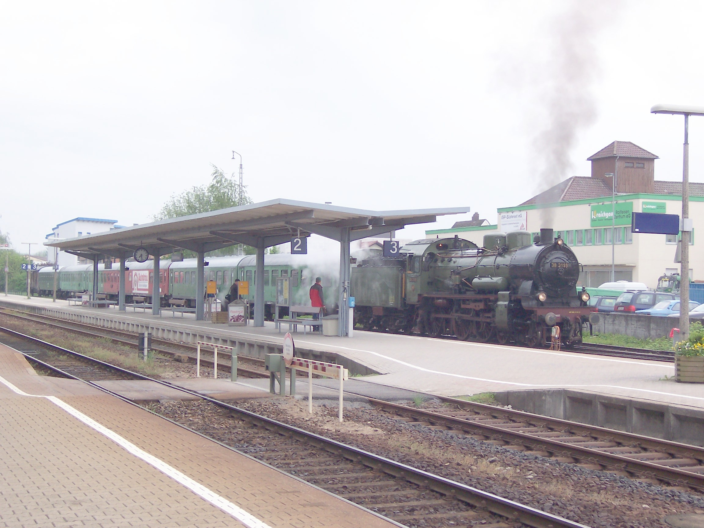 Dampfzugsonderfahrt von Sinsheim nach Darmstadt-Kranichstein. Preußische P 8 der SEH mit DR-Rekowagen Bghw vor der Bereitstellung auf Gleis 6 (heute Gleis 5) auf dem Gelände der Eisenbahnfreunde Kraichgau e.V.